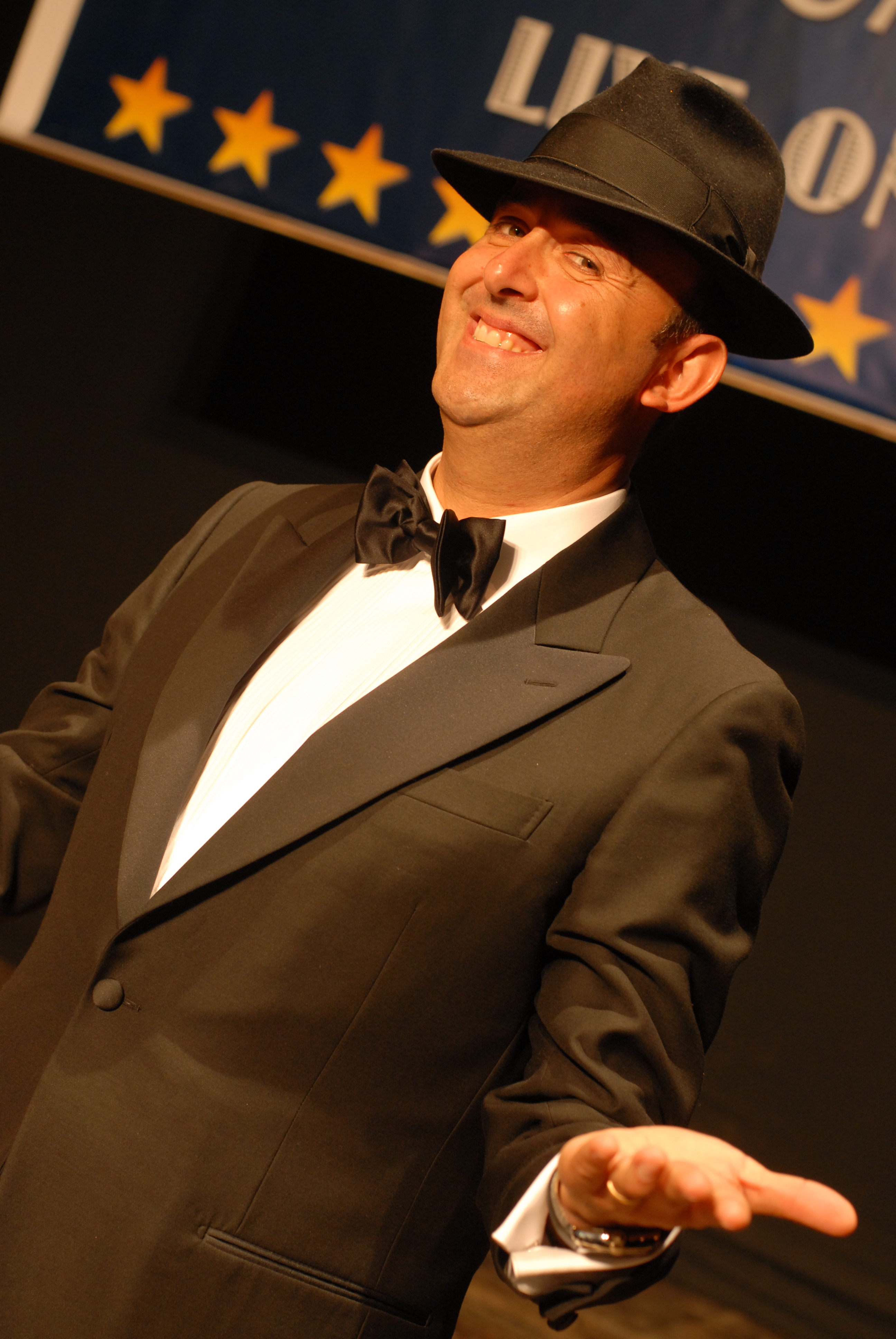 Live Show "Sasao Meravigliao"